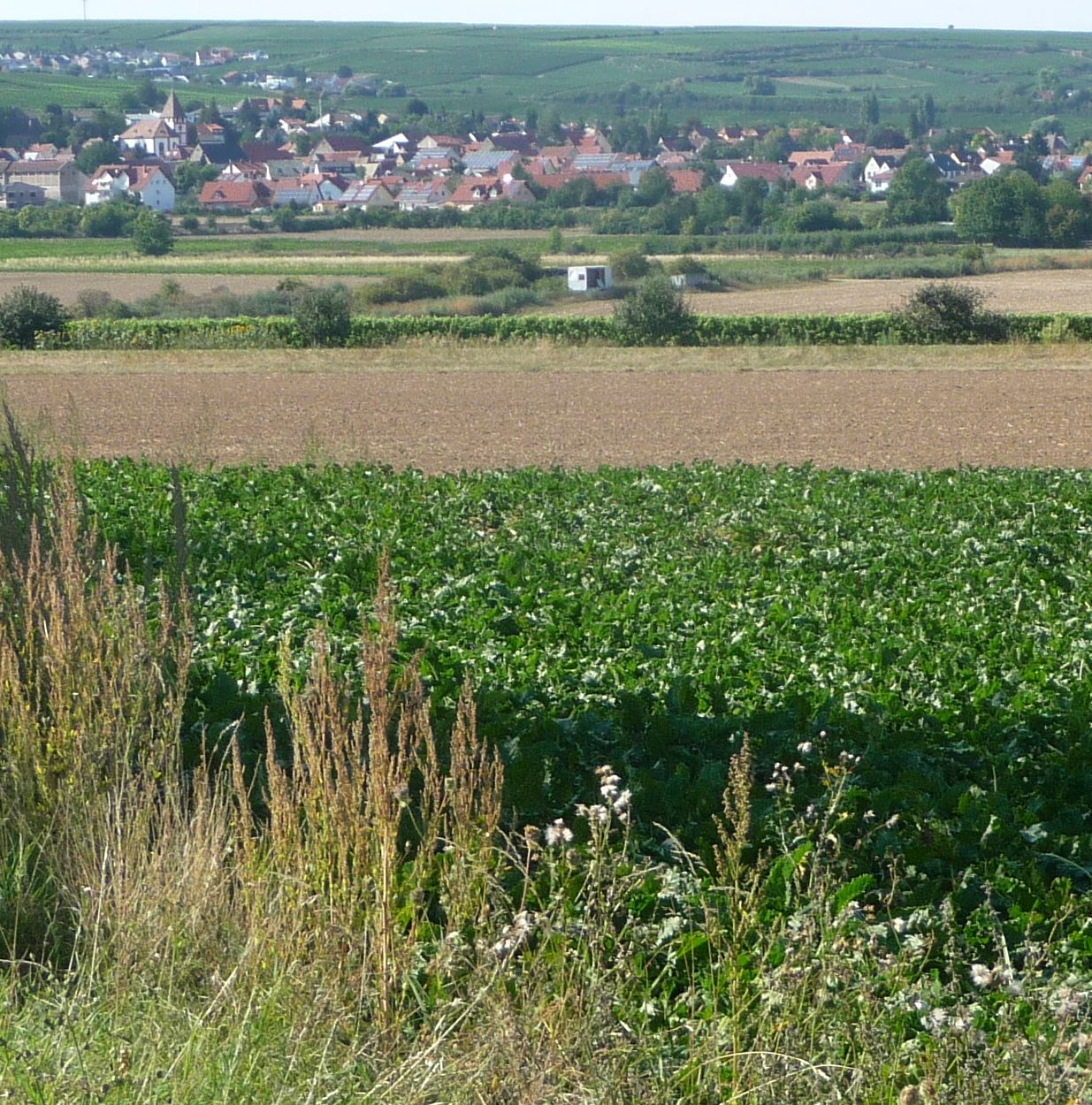 Bockenheim